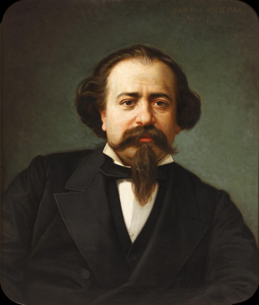 Retrato del dramaturgo y político español Adelardo López de Ayala (1828-1879), que llegó a ser ministro de Ultramar durante el reinado de Amadeo I de España.